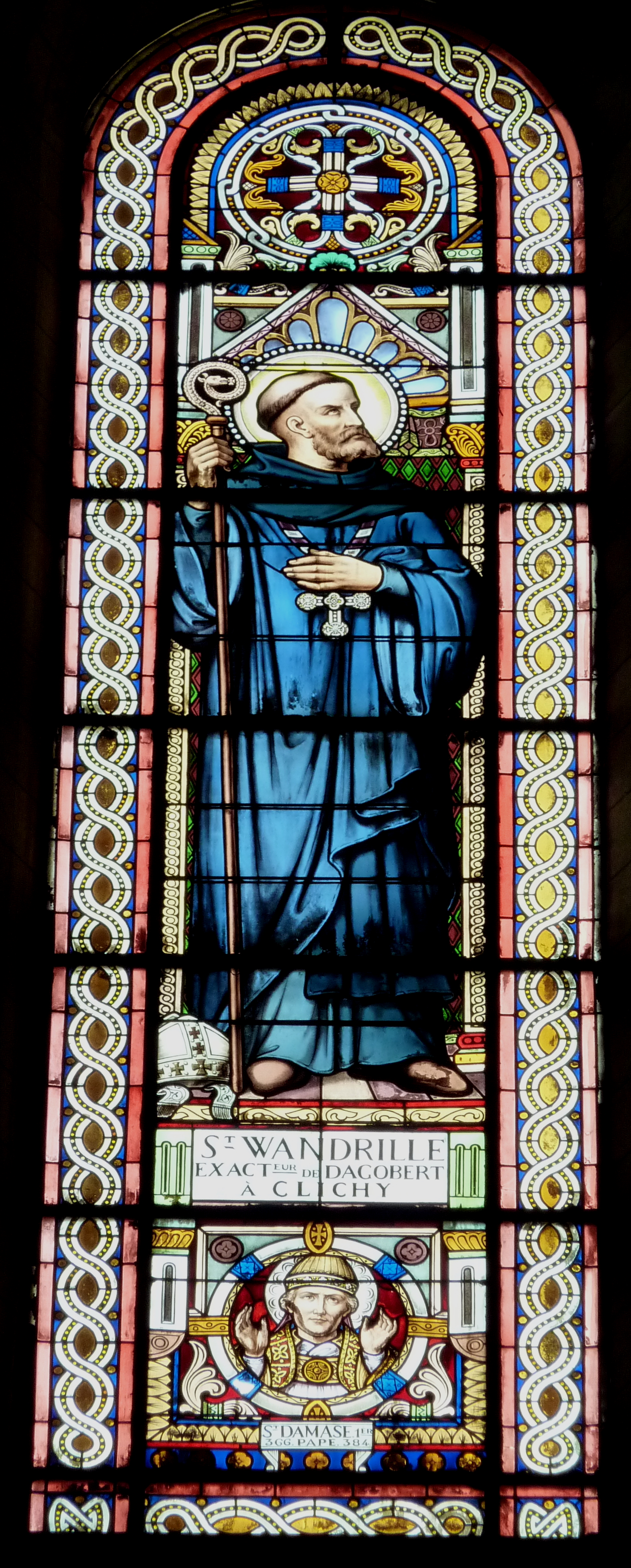 Bleiglasfenster in der katholischen Pfarrkirche Saint-Vincent-de-Paul in Clichy, Darstellung: hl. Wandregisel